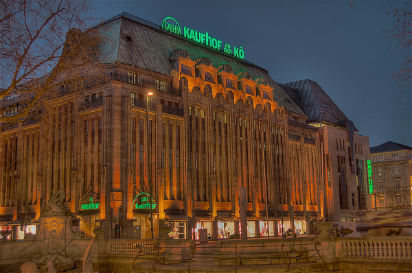 Der Kaufhof an der Kö, Düsseldorf